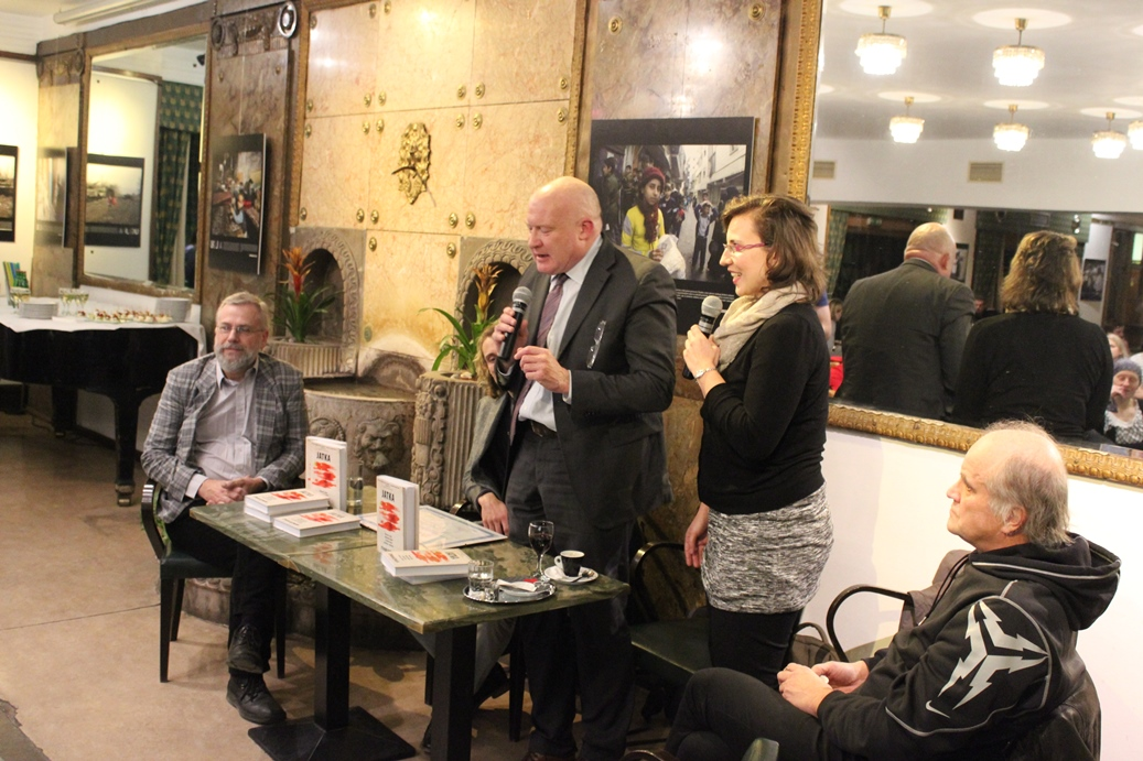 Ethan Gutmann při křtu knihy Jatka 12. ledna 2016 v baru pražské Lucerny. Kmotři knihy: nalevo Jan Payne, napravo Michael Kocáb.